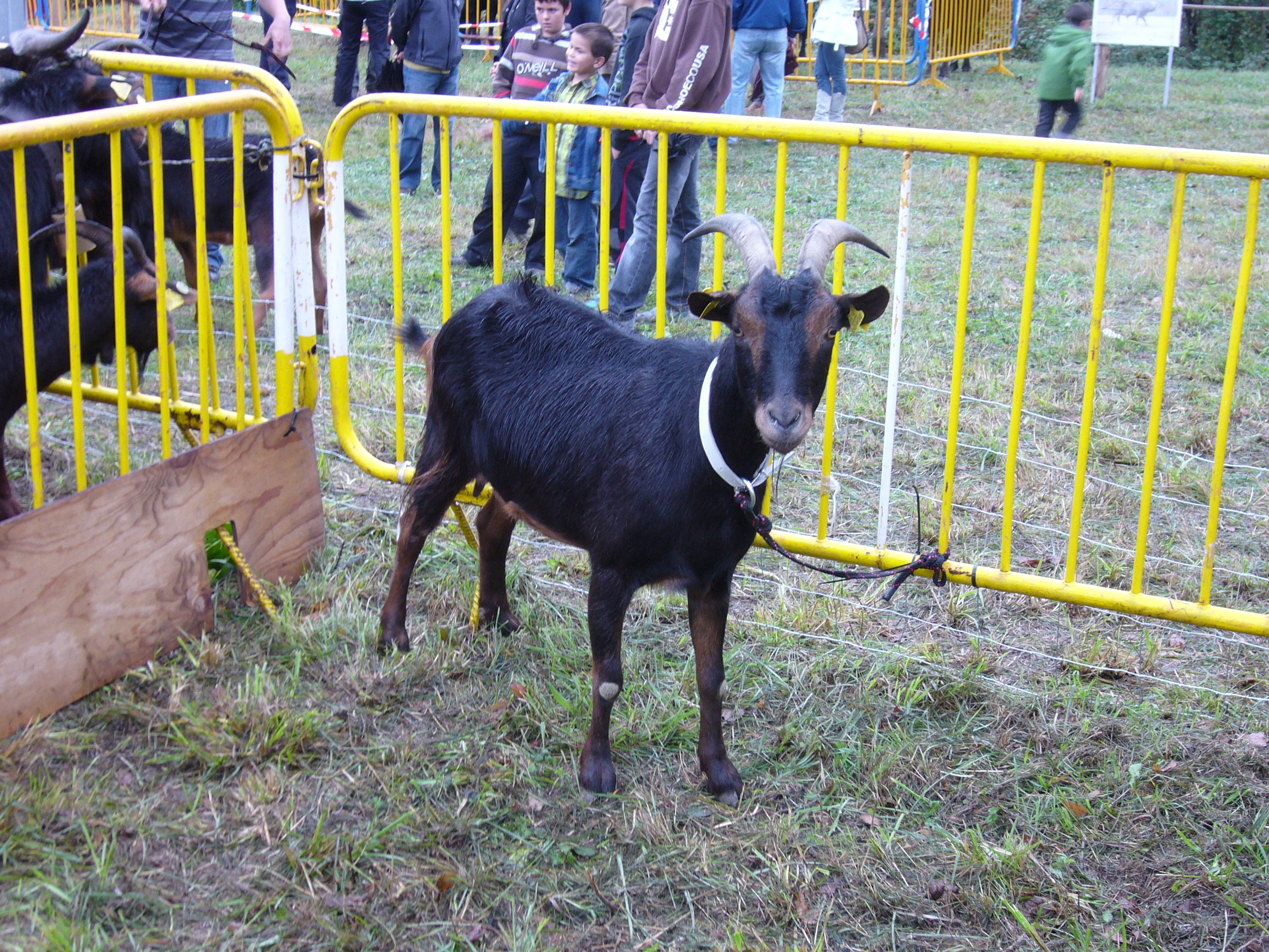 Ahuntz azpigorria Ormaiztegiko azokan